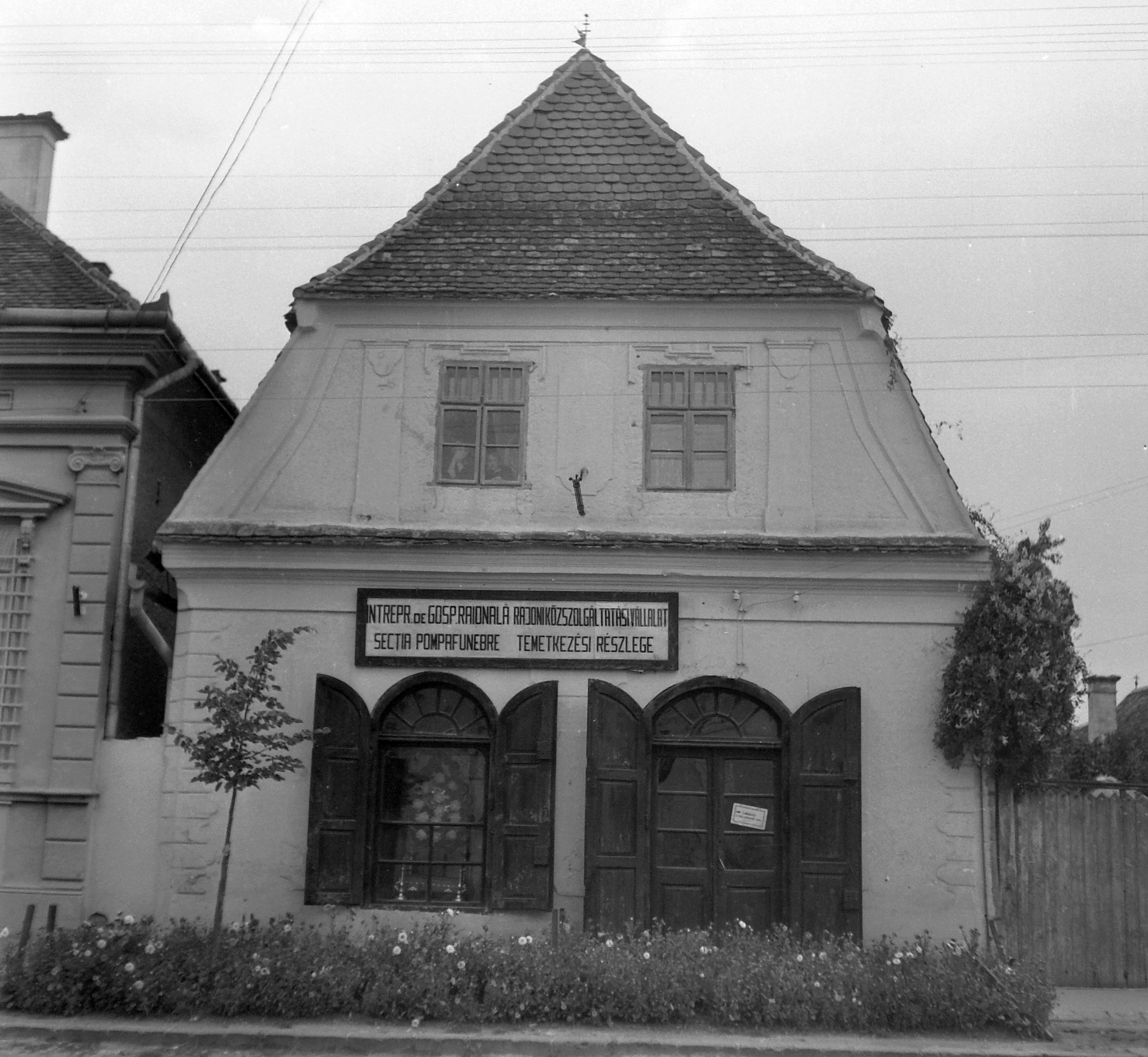 Márton Áron utca 7.